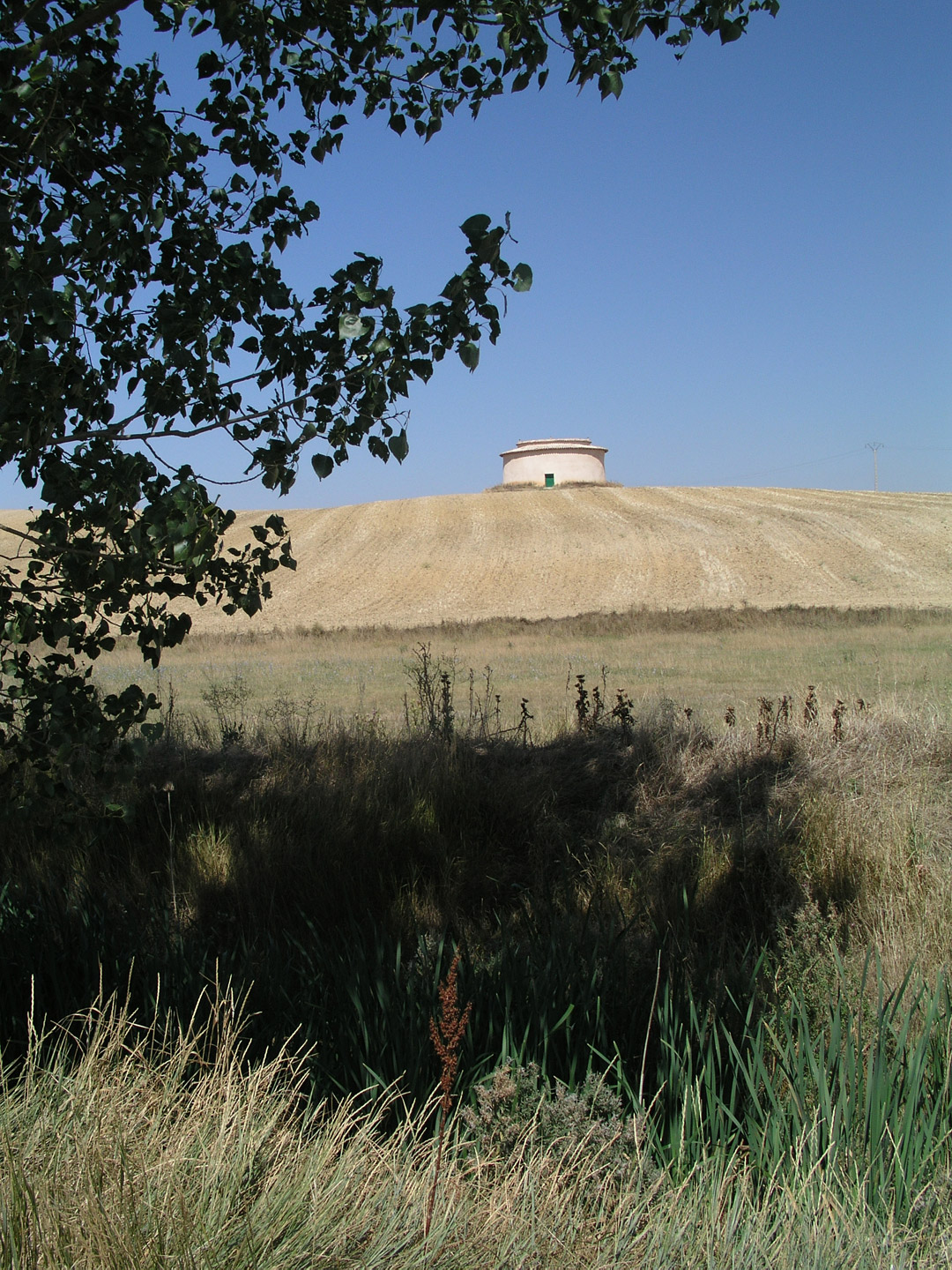 Palomar en Palazuelo de Vedija (Tierra de Campos, Valladolid).